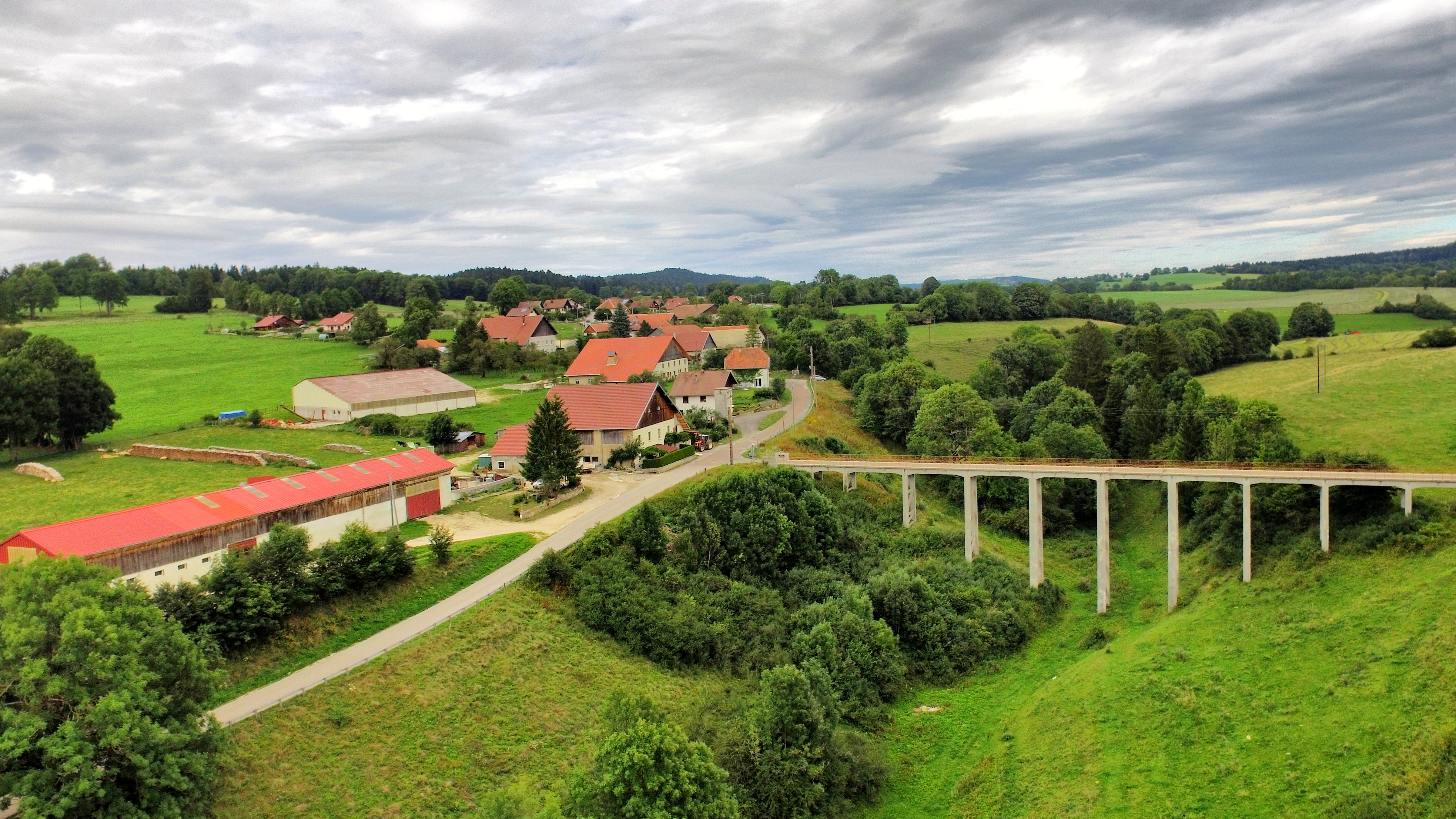 Le village et son pont